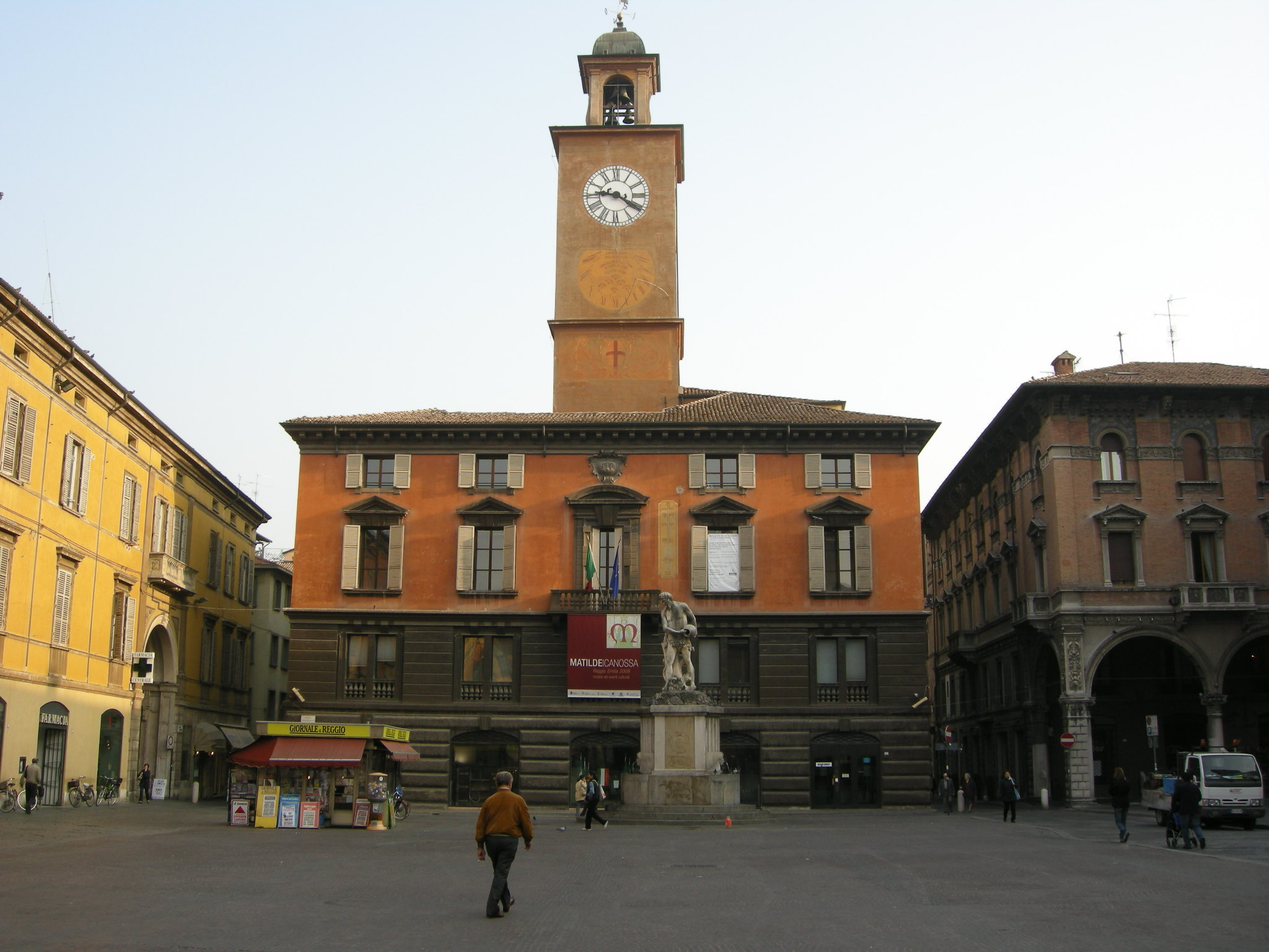 Piazza duomo (Reggio emilia)